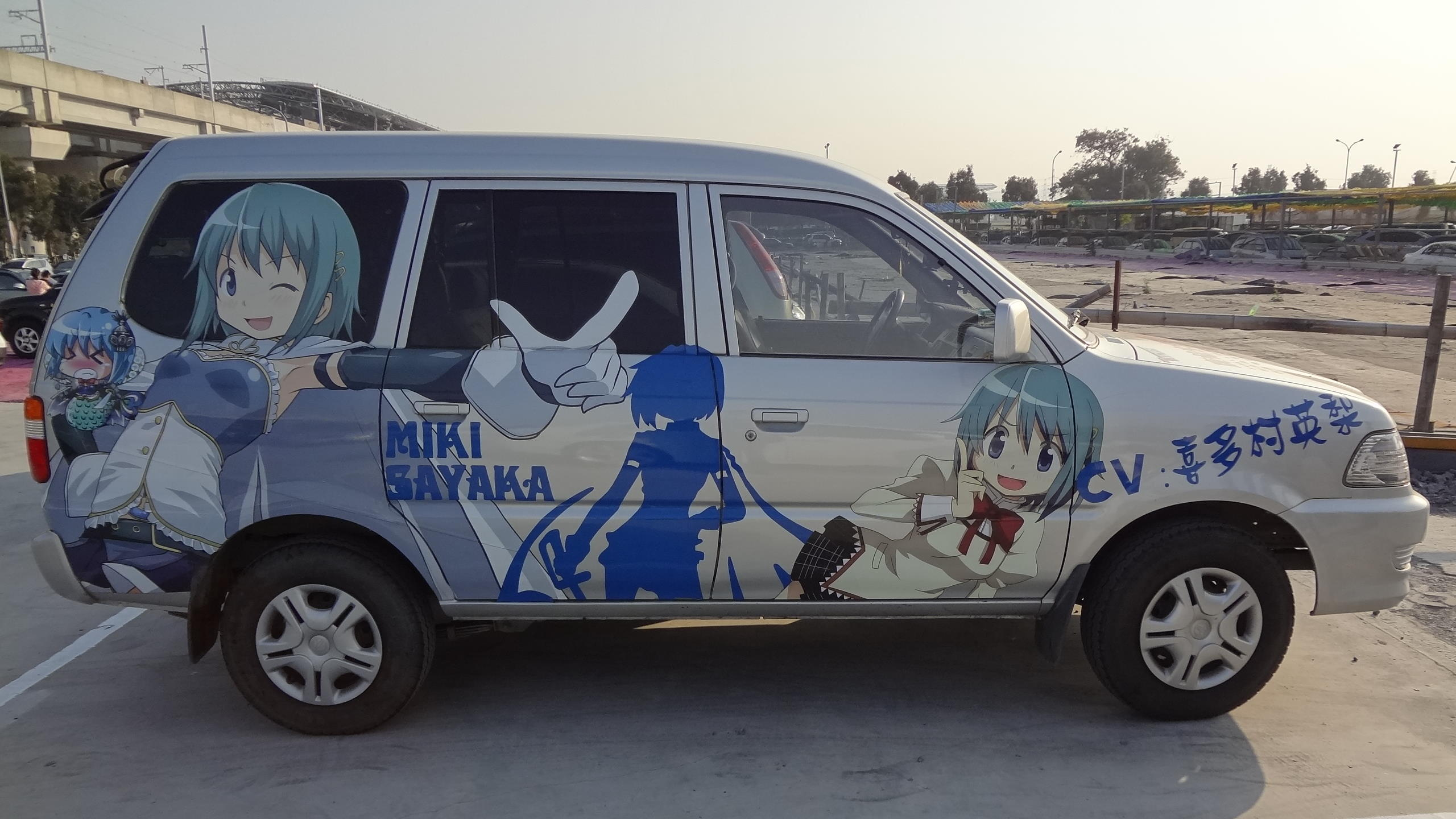 中文（台灣）: 2013臺中動漫節，停在大臺中國際會展中心外的豐田瑞獅Surf DX《魔法少女小圓》痛車右側外觀。